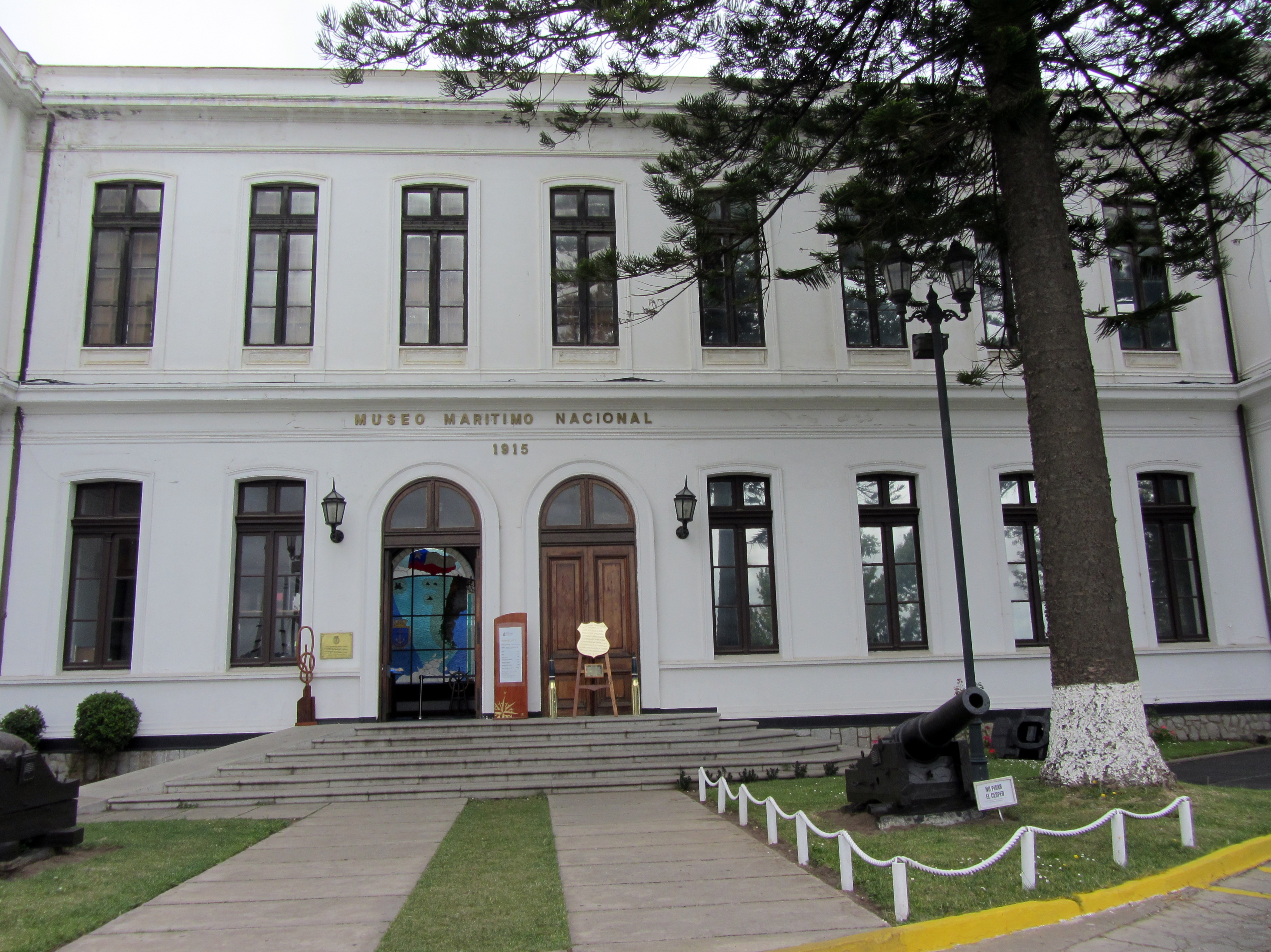 Entrada al Museo Marítimo Nacional, que ocupa el ala norte del edificio de la ex Escuela Naval, llamado oficialmente edificio Almirante Luis Uribe Orrego, en Valparaíso.